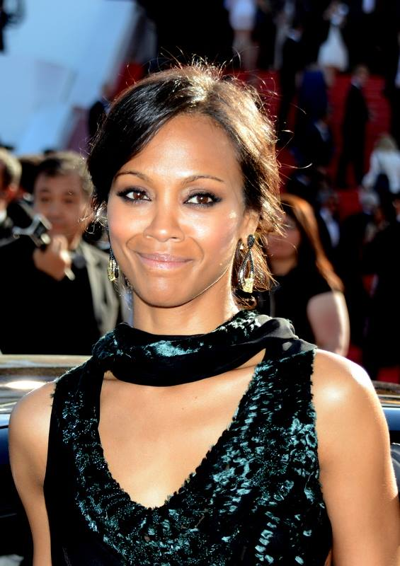 Zoe Saldana au festival de Cannes